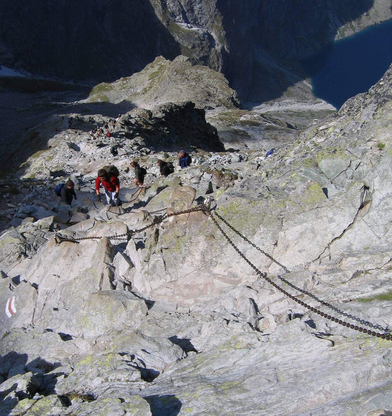 Wejście na Rysy od strony Polski.